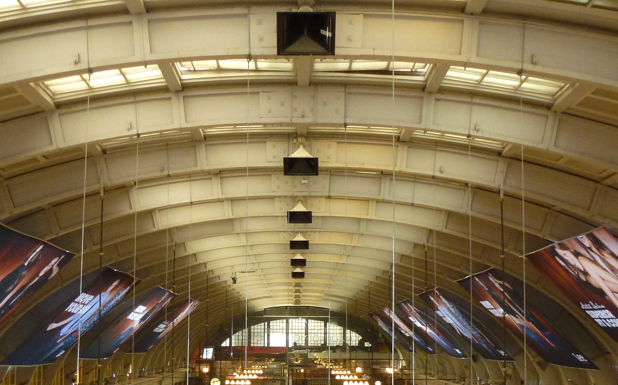 Stockholms central, Centralhallens takkonstruktion